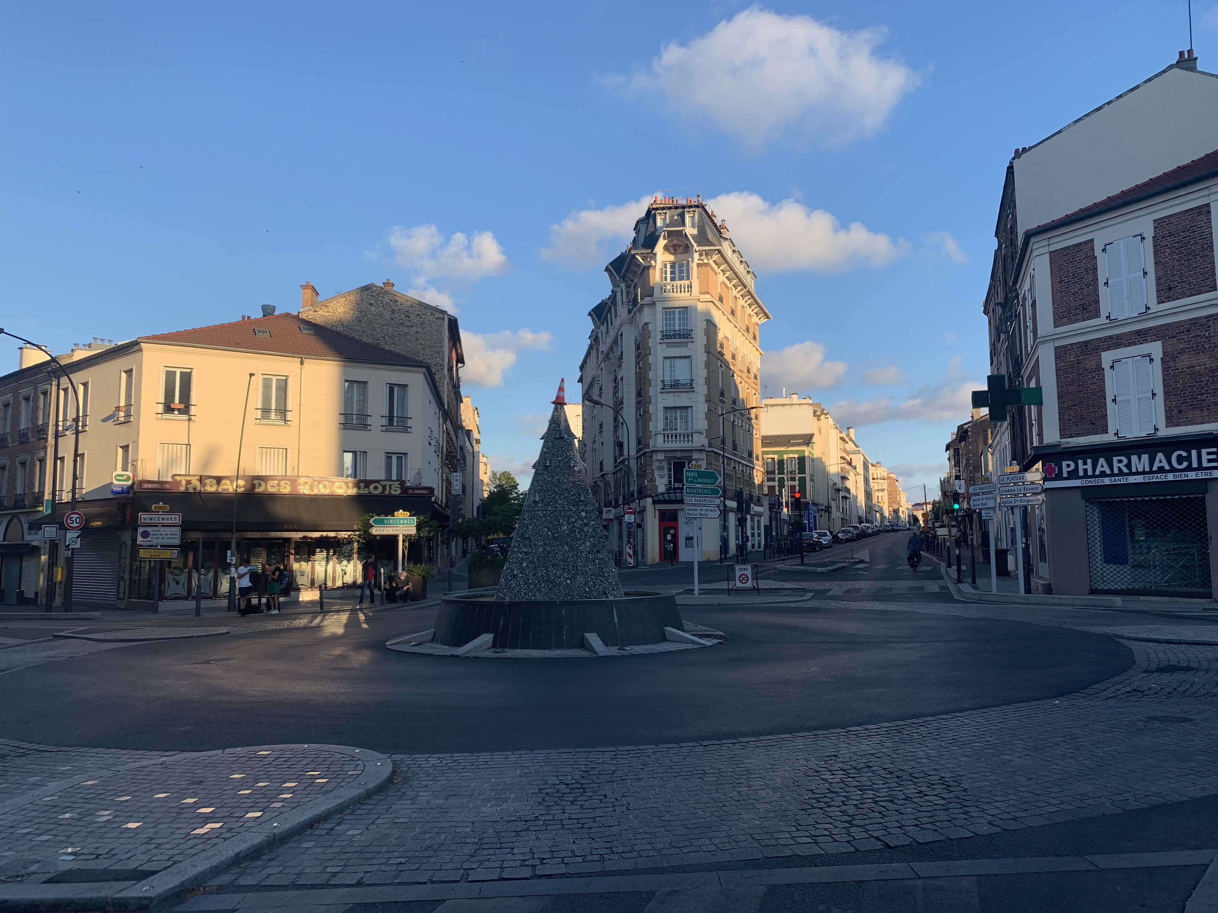 Carrefour des Rigollots, Fontenay-sous-Bois.